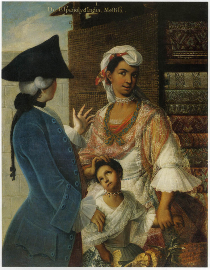 Pintura de Castas, 1. De español e india, Mestizo